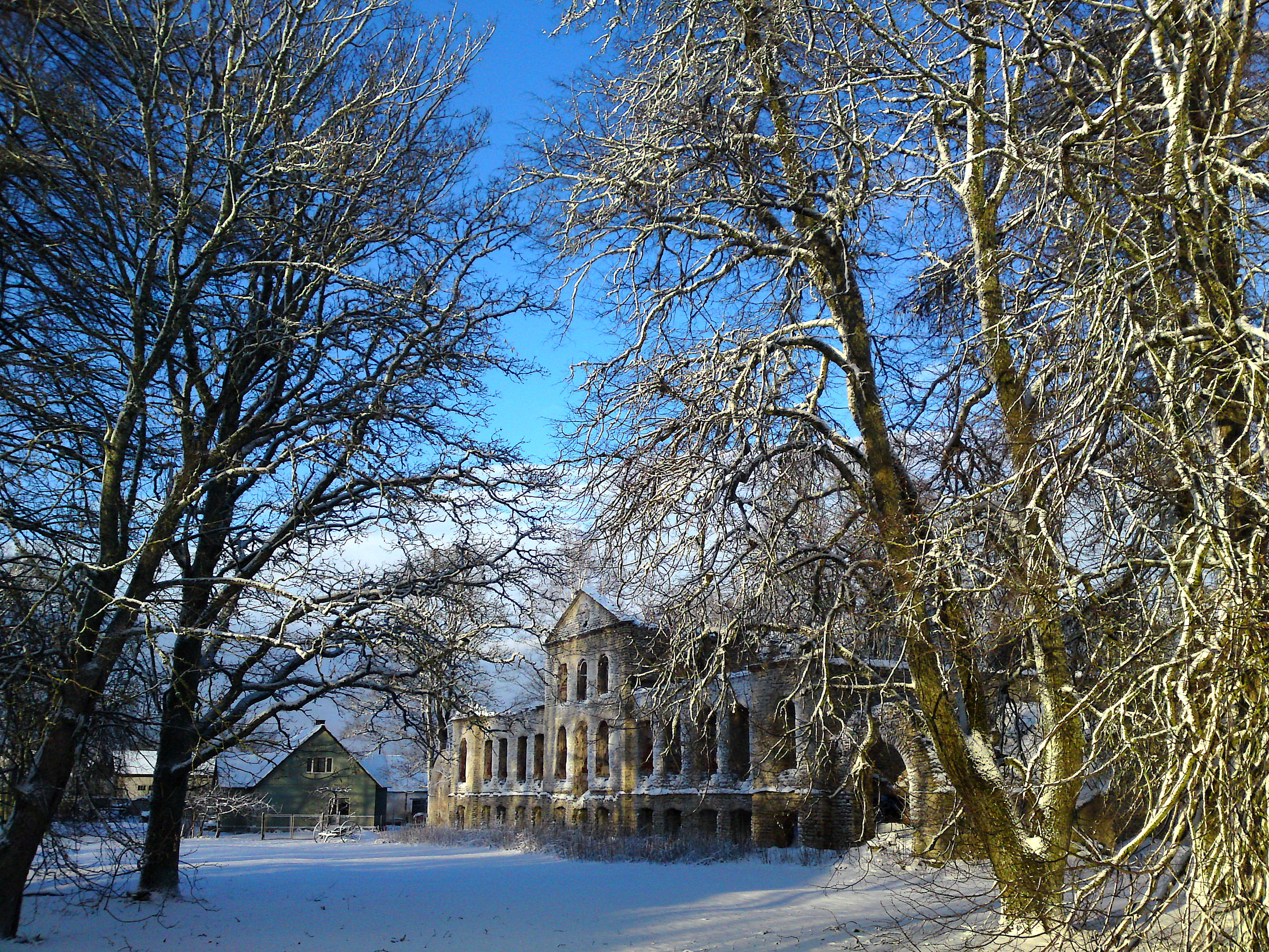 Keava mõisa peahoone, Linnaaluste küla, Kehtna vald